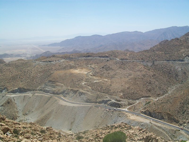 Panoramico de la autopista, visto desde una de las paradas superiores, hacia la laguna Salada